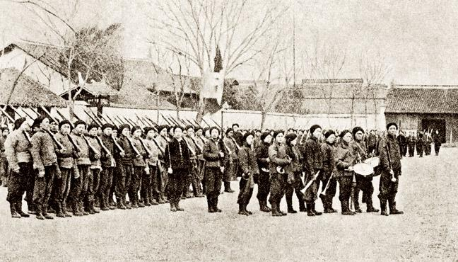 清朝湖北新軍の儀仗隊と軍楽隊